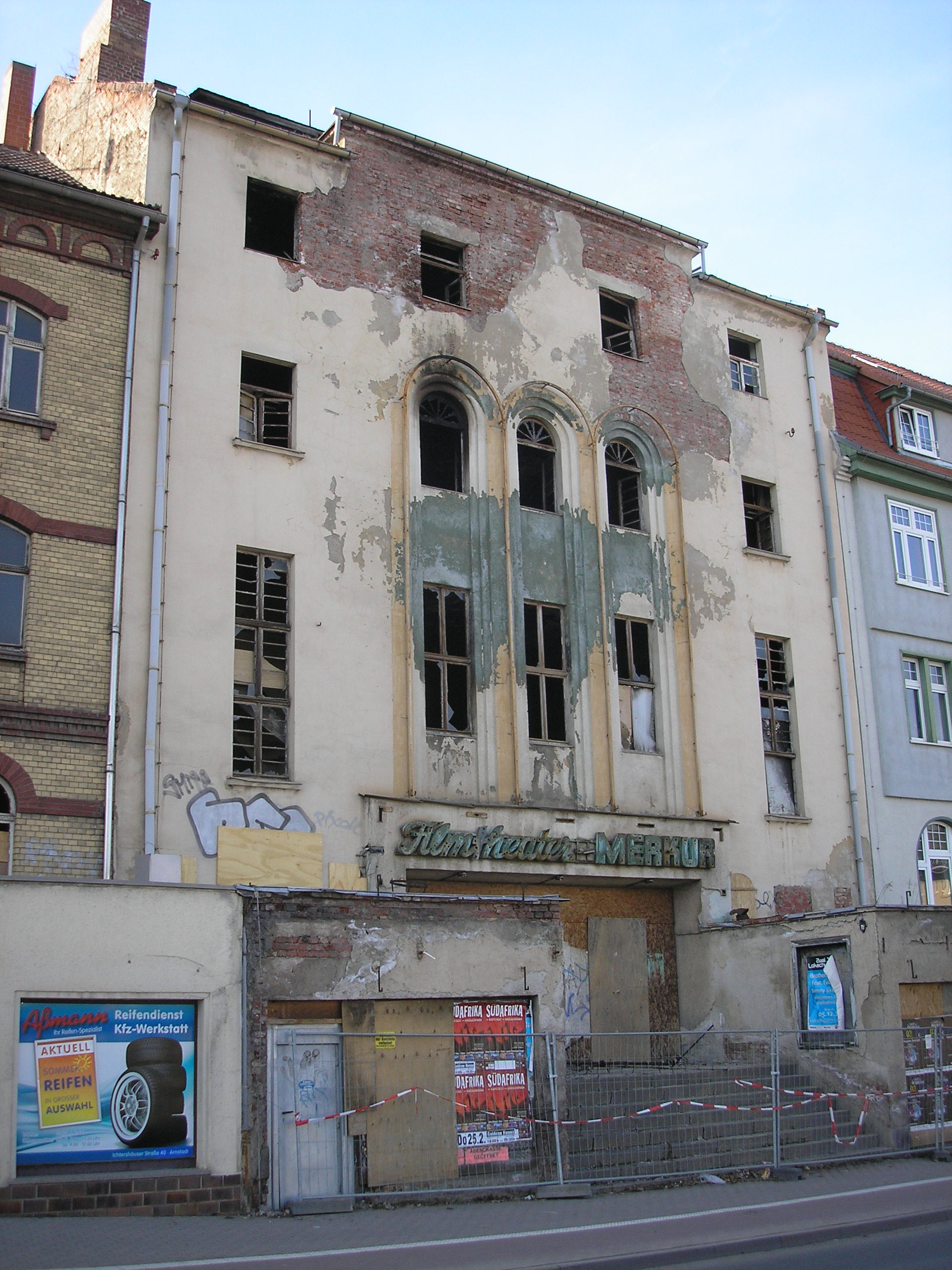 Das ehemalige Kino Merkur in Arnstadt (Thüringen).